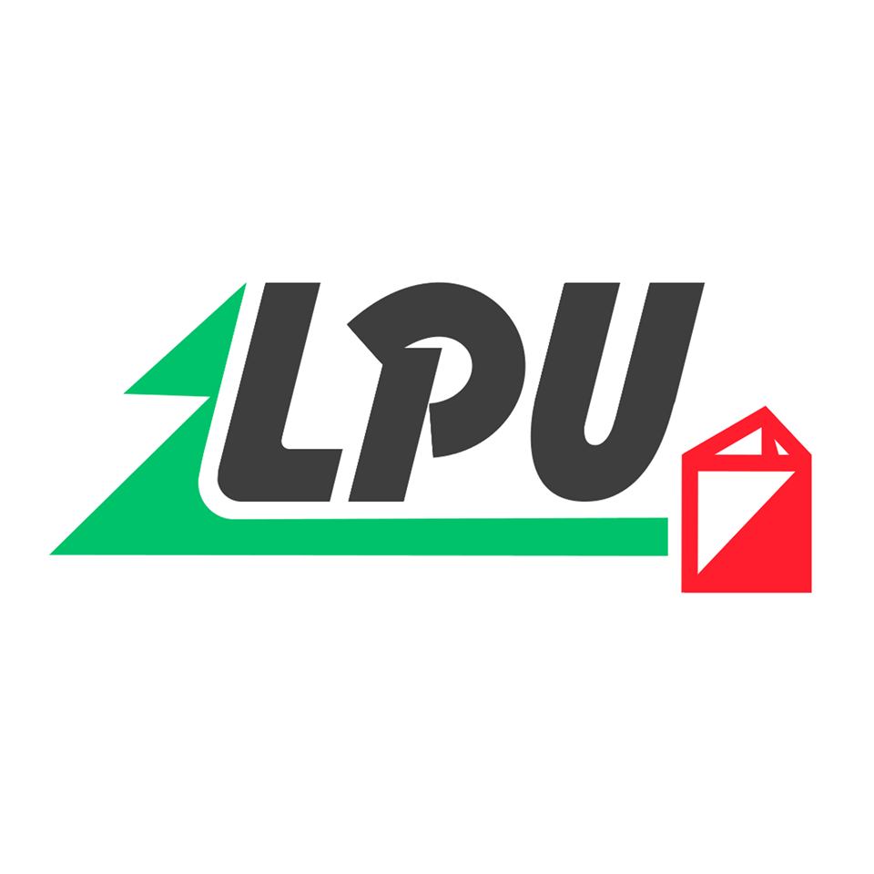 Logo OK Lokomotiva Pardubice, edit by Ondra Paleček